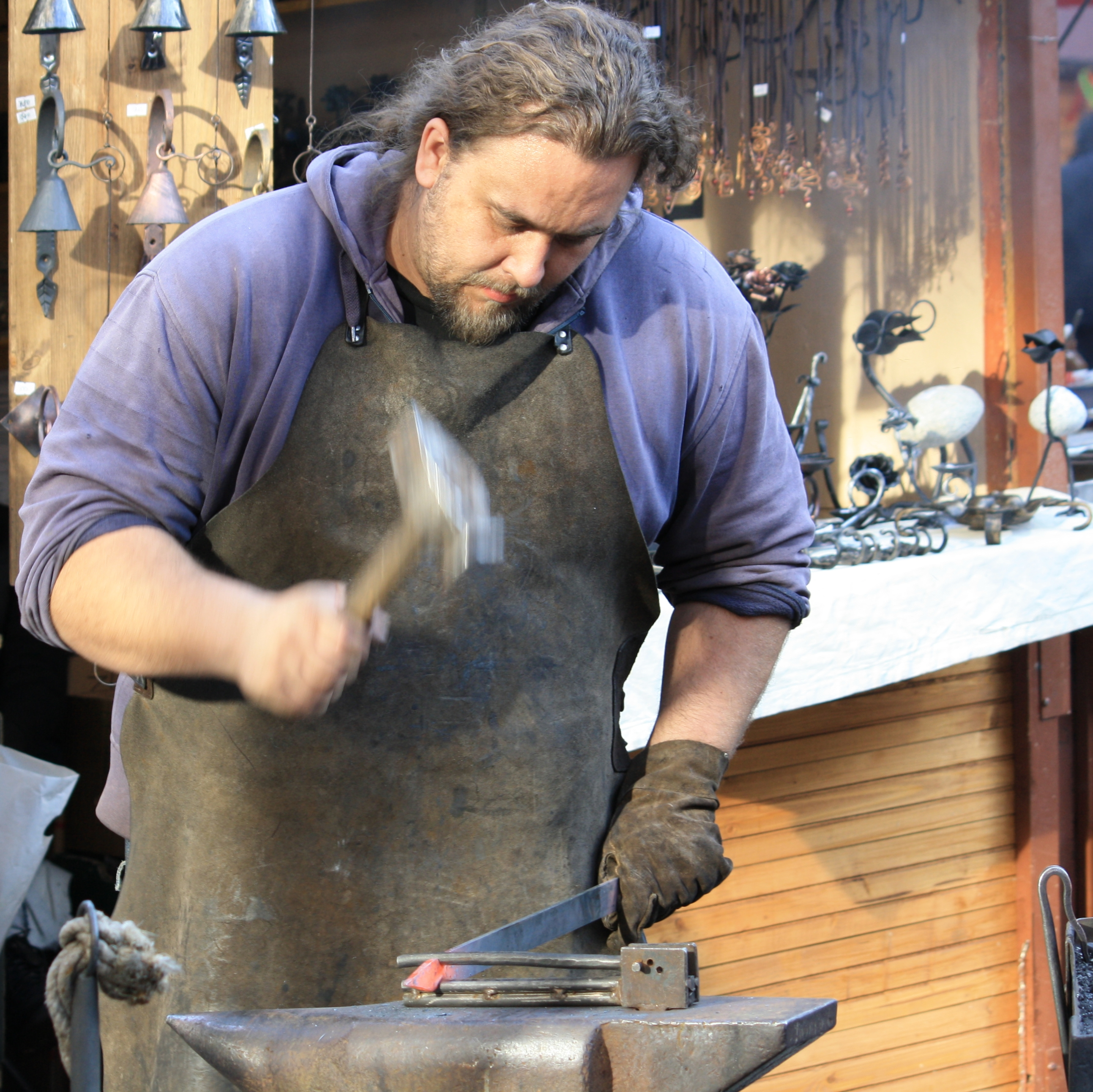 Kovář při práci (Velikonoční trhy na Václavském náměstí)